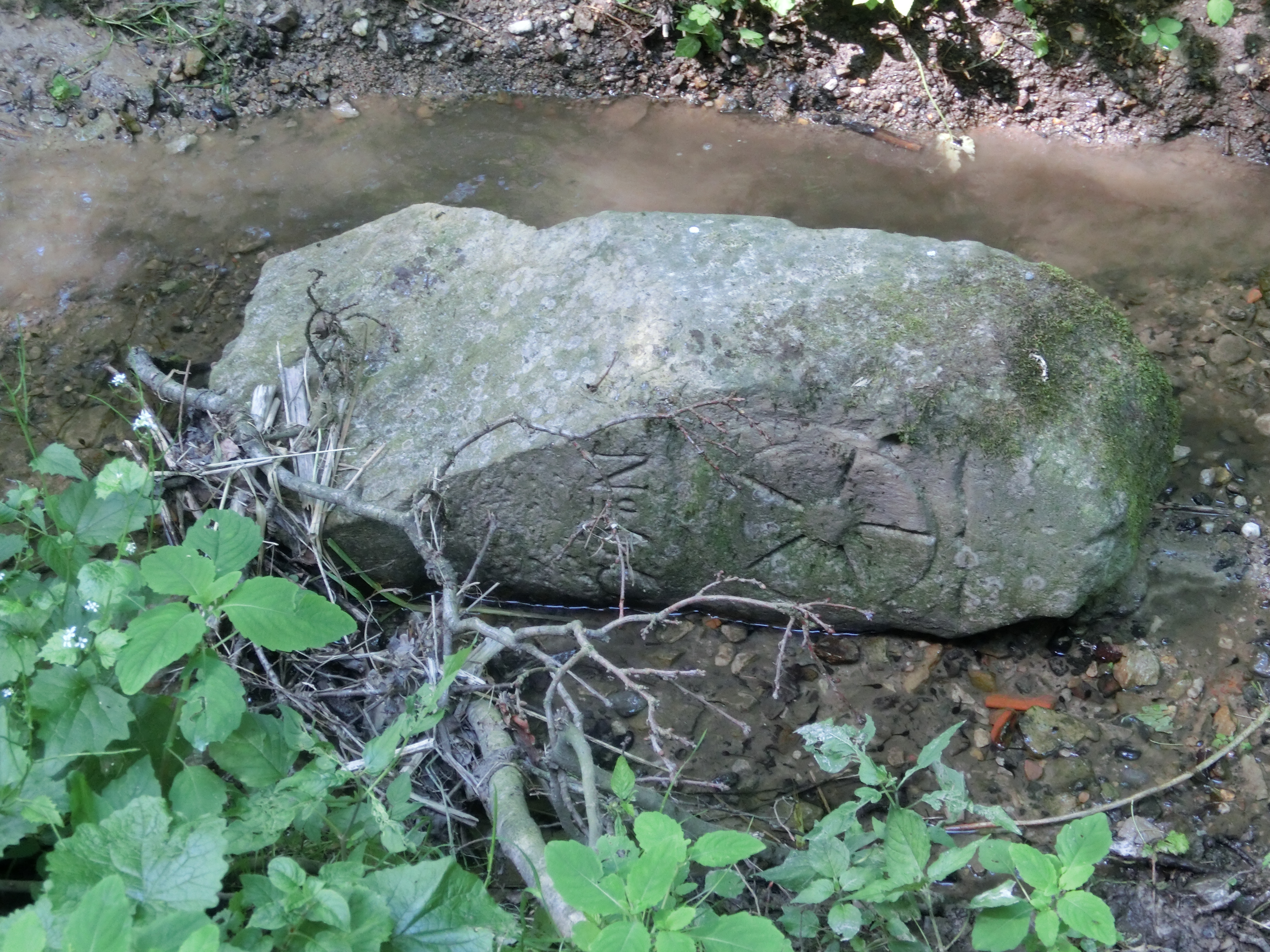 Deutschland (D) - Nordrhein-Westfalen (NW) - Kreis Herford (HF) / Kreis Lippe (LIP): Landesgrenzstein Nr. 60